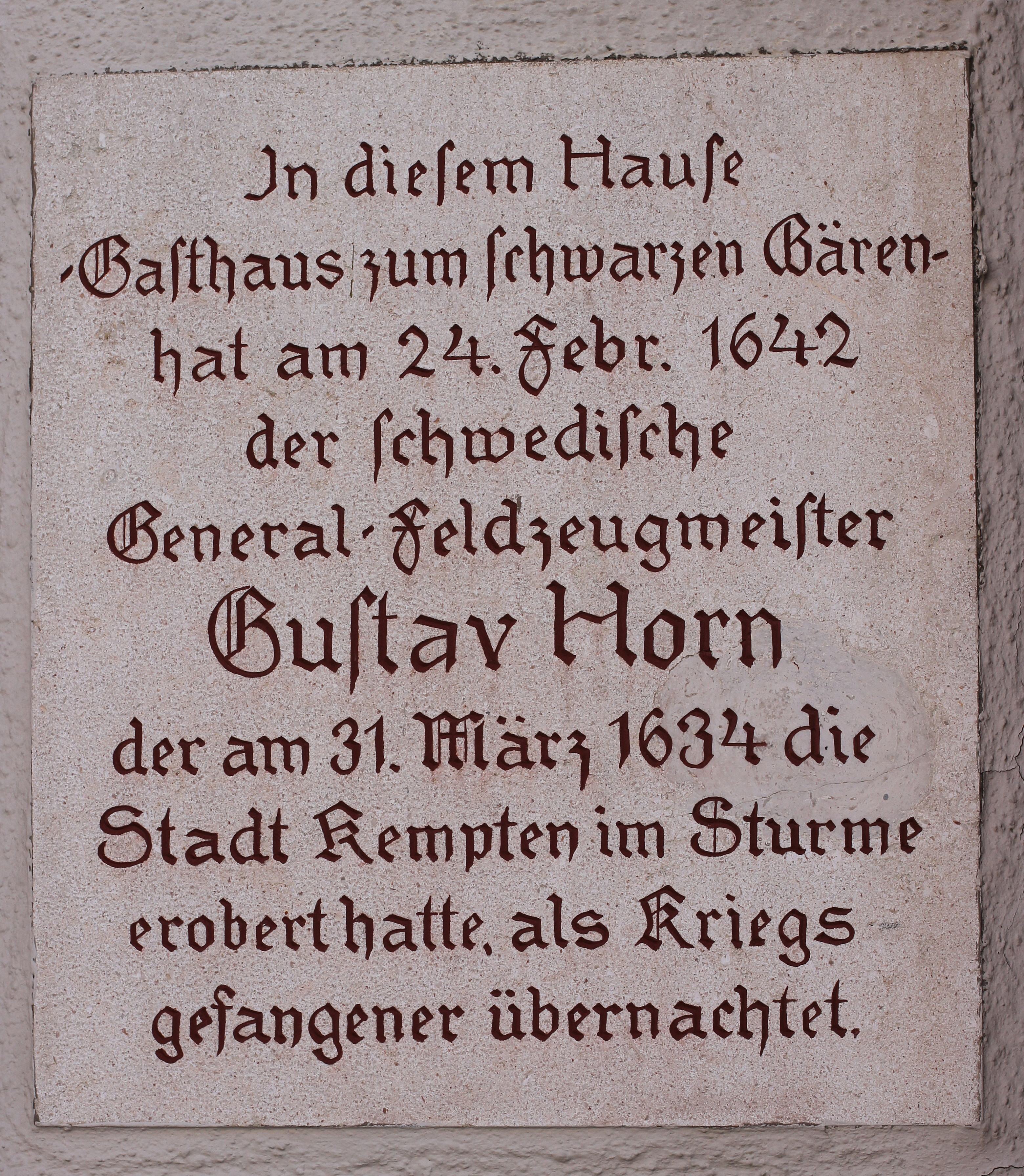 Details über den Aufenthalt von Gustaf Horn während der Dreißigjährigen Kriegs in Kempten Lage: Rathausplatz in Kempten